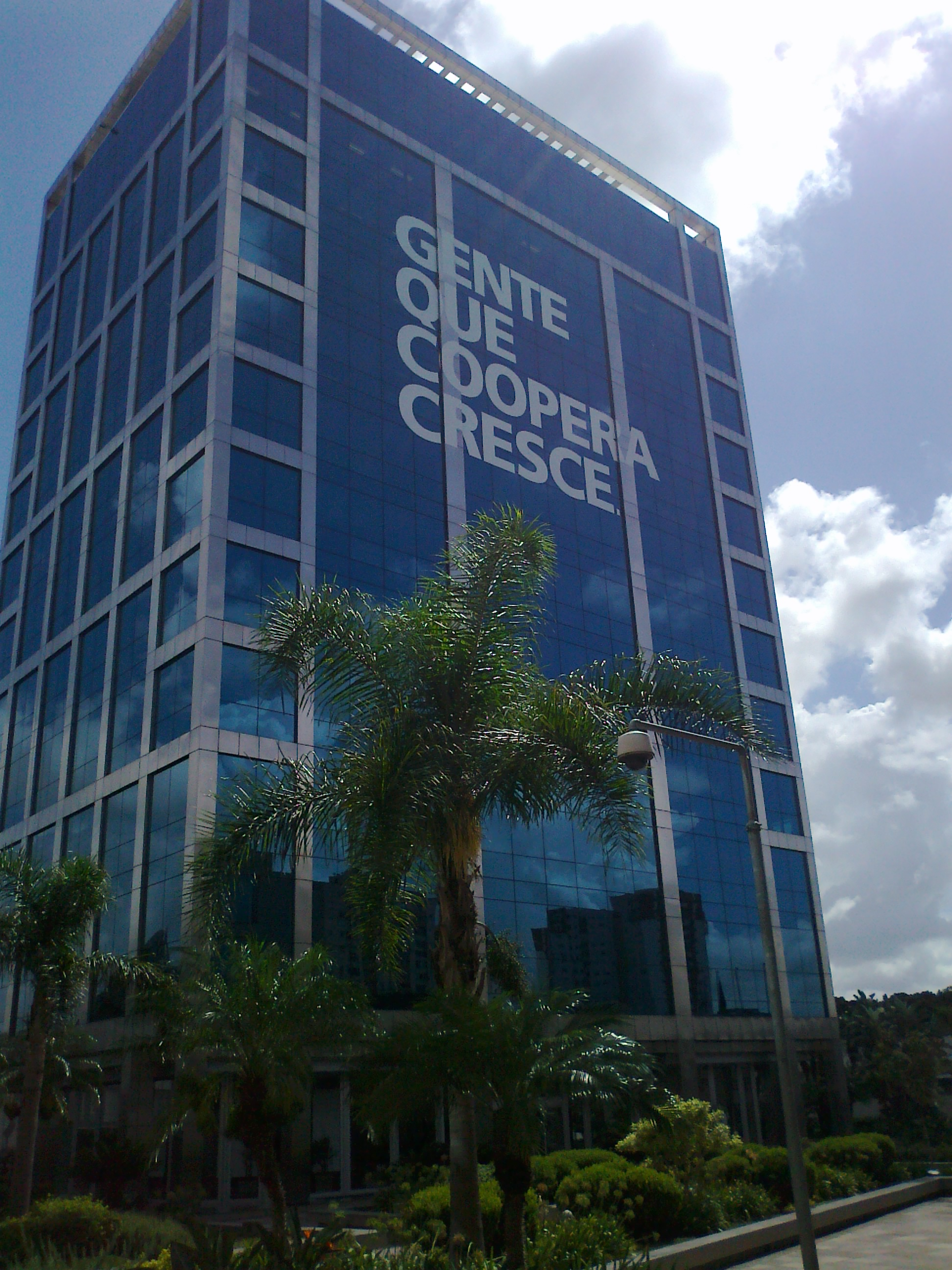 Sede do Banco Cooperativo Sicredi S.A. em Porto Alegre/RS